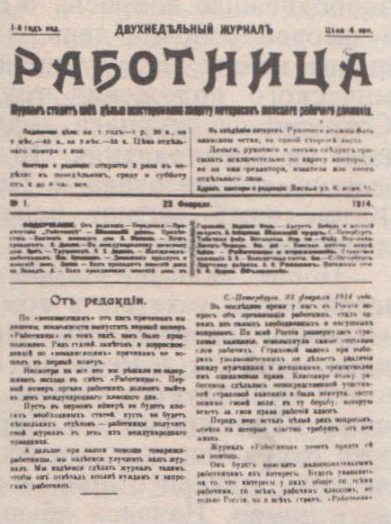 Copie de la 1ère page du 1er numéro de la revue La travailleuse (Rabotnitsa) 23 février 8 mars 1914